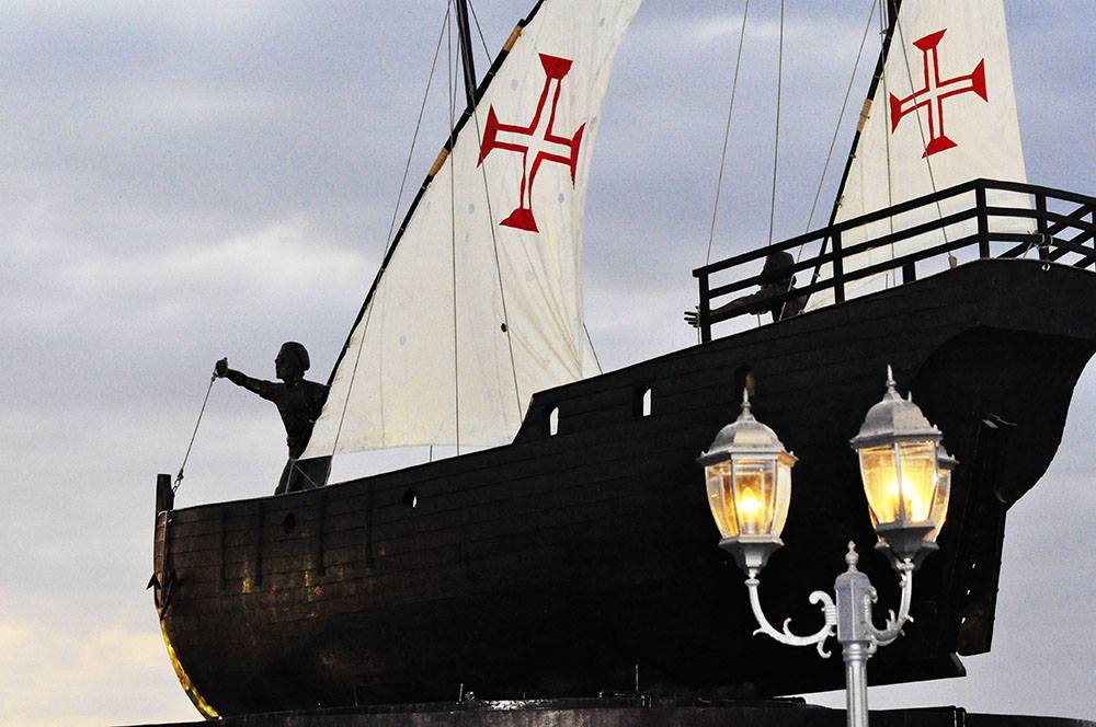 Tetun: Monumentu Lifau